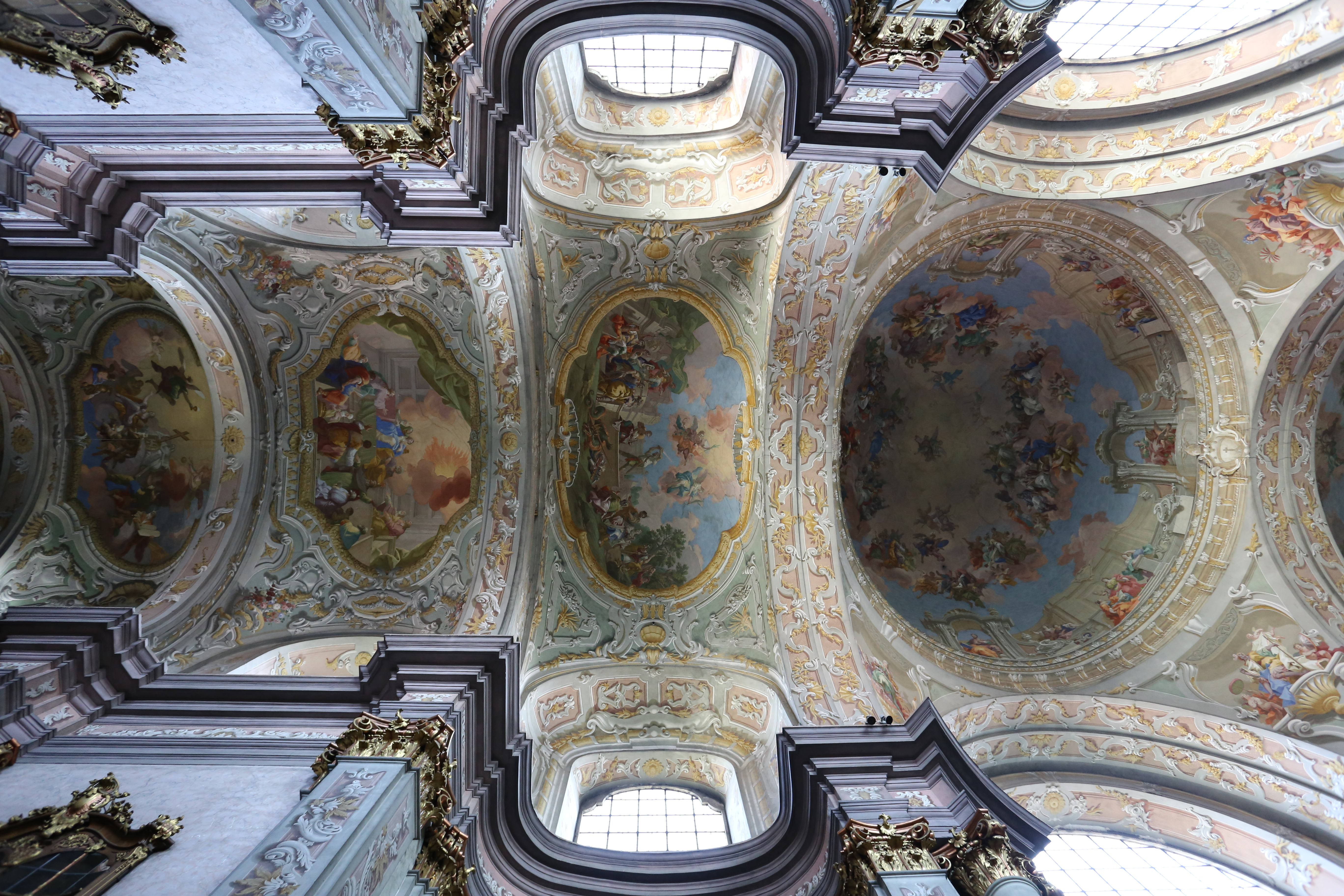 Deckenmalerei in der Stifts- und Pfarrkirche hll. Georg und Stefan in der niederösterreichischen Stadt Herzogenburg. Diese illusionistische Architektur- und Ornamentmalerei führte Domenico Francia in den Jahren 1748/49 (Presbyterium) und 1751/55 (Langhaus) aus.